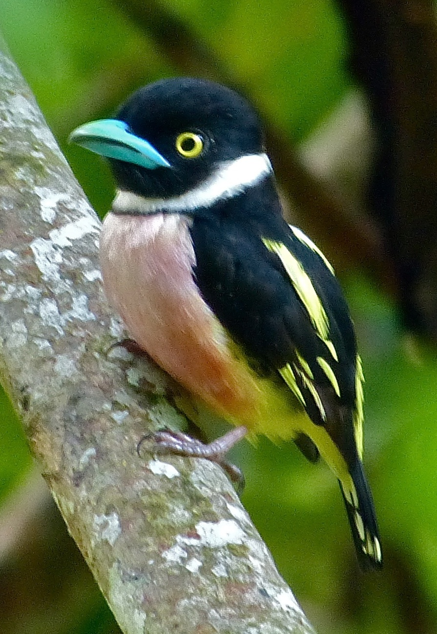 Bilit, Sabah, MALAYSIA